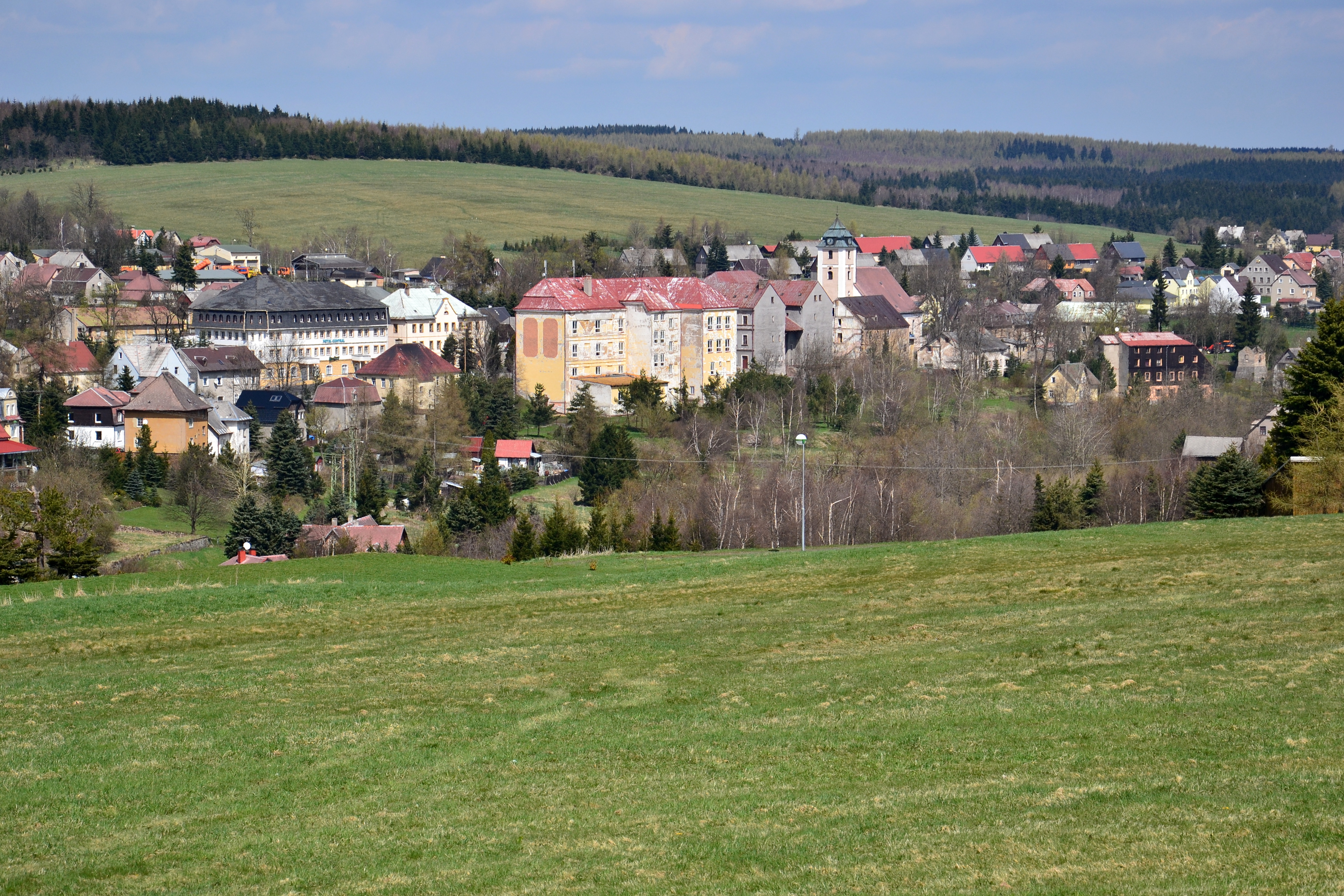 Kovářská – centrum městyse (pohled od železničního přejezdu nad Měděneckou ulicí)